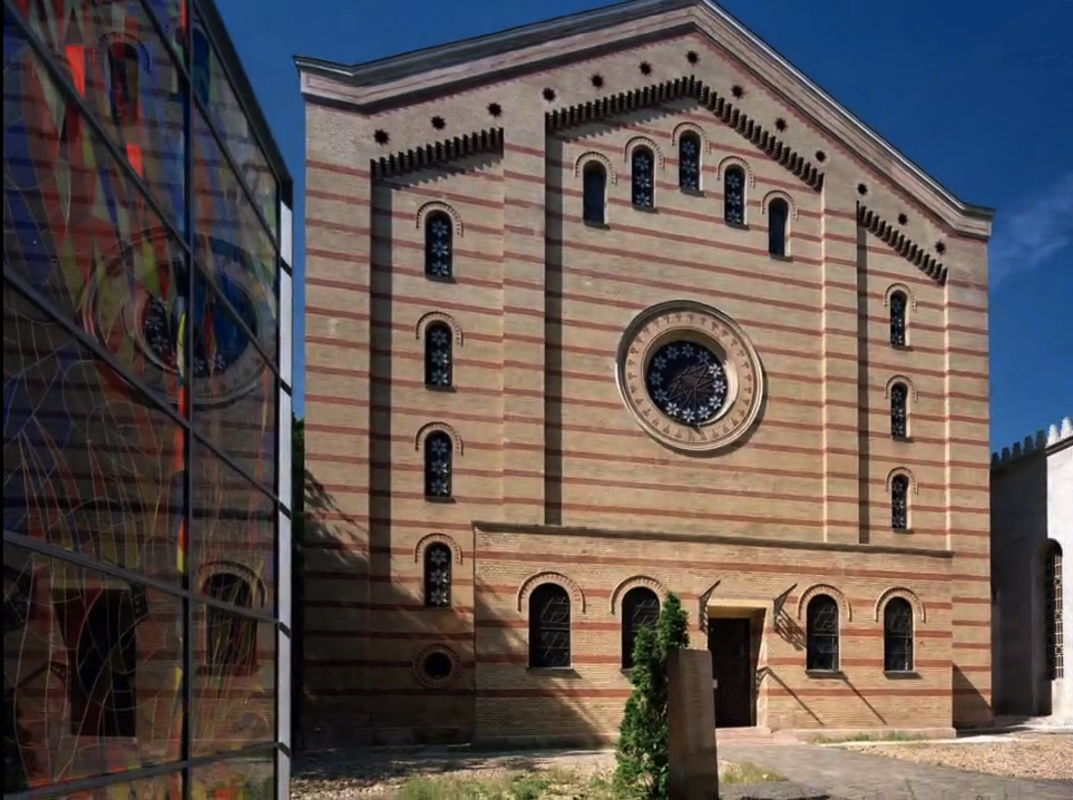 A Dohány utcai zsinagóga hátulról (Budapest)